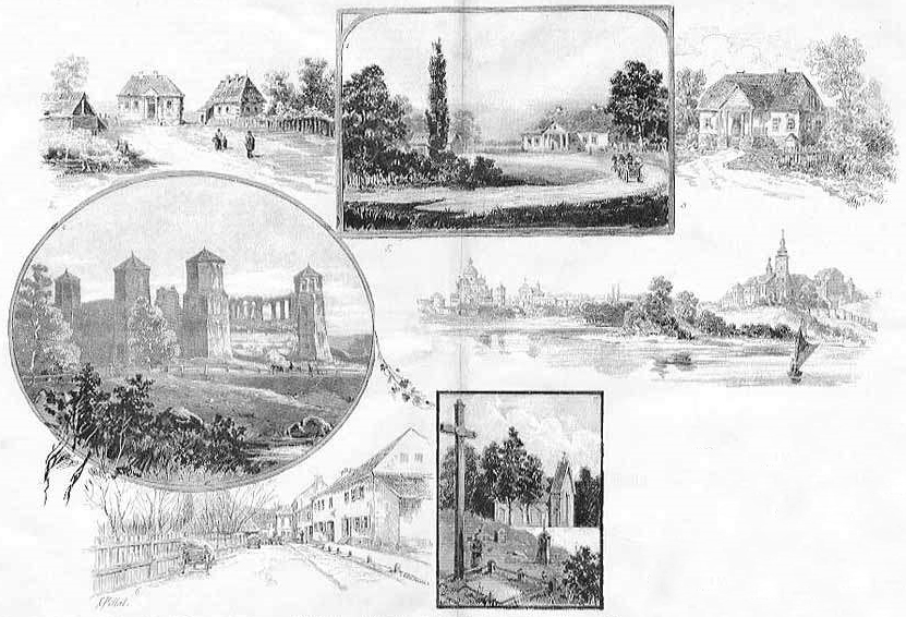 Беларуская (тарашкевіца): Мясьціны, зьязаныя з Уладзіславам Сыракомлем: Залучча (Załučča), Смольгаў (Smolhaŭ), Барэйкаўшчына (Barejkaŭščyna), Мір (Mir), Нясьвіж (Niaśviž), Каралеўская вуліца ў Вільні (Vilnia), могілкі Росы ў Вольні (Vilnia)